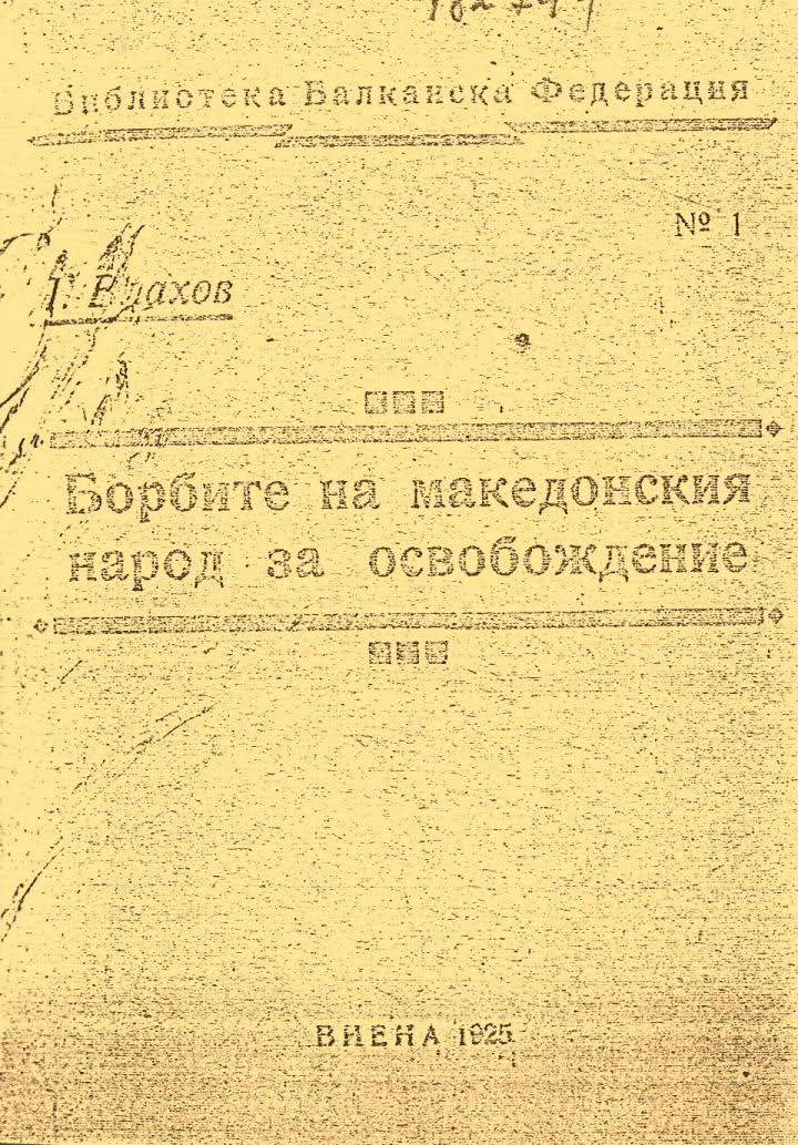 Корица на книгата на Димитър Влахов „Борбите на македонския народ за освобождение“.